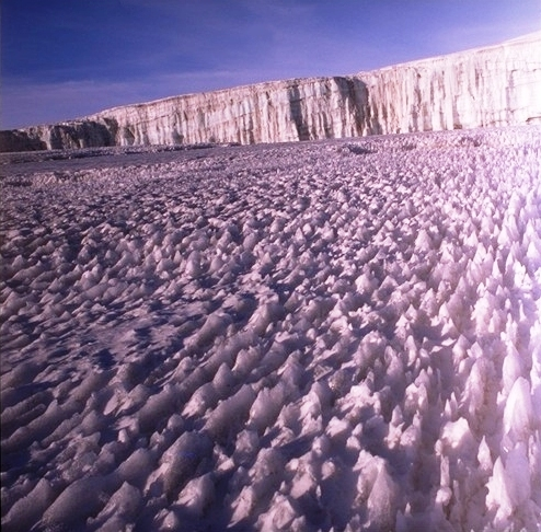 Kilimanjaro National Park - Tanzania